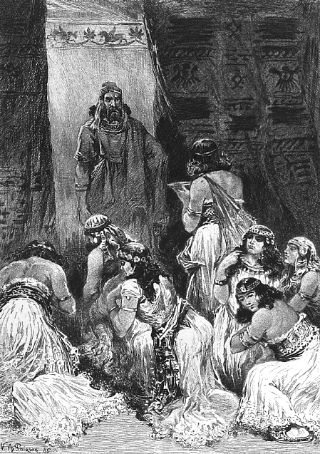 Salammbô, Gustave Flaubert: Hamilcar s'arrêta en apercevant Salammbô.